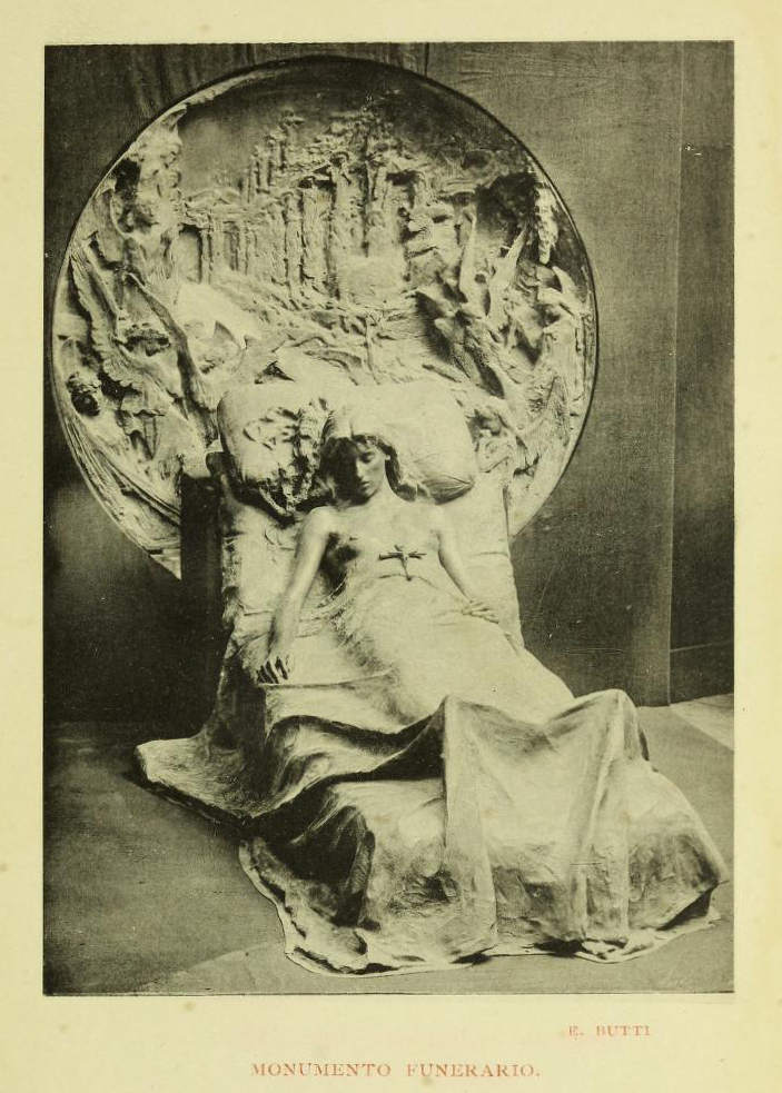 Edicola Casati, fotografia del 1901 scattata durante la Prima Esposizione Triennale 1891, Milano